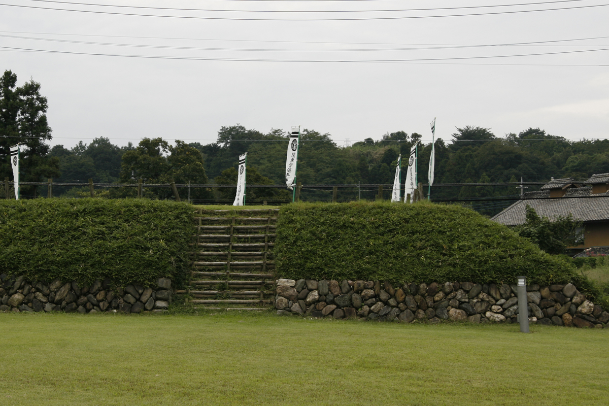 平井城